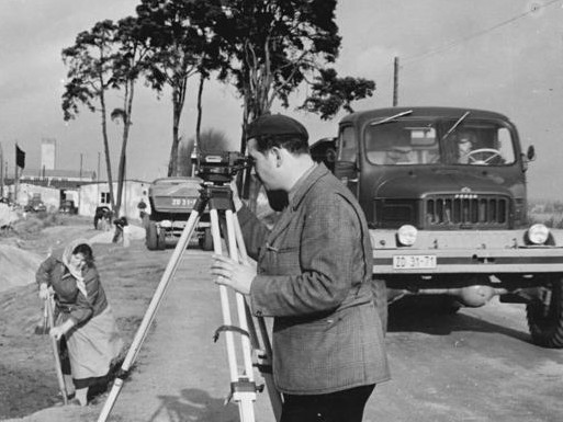 Zentralbild-Zühlsdorf Bu-Wz 22.10.59 Neues Chemiefaserkombinat entsteht in Guben. Eines der größten Kunstfaserkombinate entsteht gegenwärtig in Guben an der Oder-Neiße-Friedensgrenze auf dem Ruinengelände eines ehemaligen faschistischen Munitionswerkes. Vor dem eigentlichen Baubeginn müssen etwa 90 000 Kubikmeter Stahlbeton-Überreste des Rüstungswerkes beseitigt werden. Tag für Tag hallen die dumpfen Detonationen der Sprengungen über den Bauplatz. In mühevoller Arbeit haben die Bauarbeiter bereits über 63 000 Kubikmeter Beton geräumt, obwohl die Arbeiten durch gefährliche Hindernisse erschwert wurden. Das Kombinat wird 1963 die Produktion aufnehmen und bis zum Ende des Siebenjahrplanes eine jährliche Leistung von 3 000 Tonnen Dederonfeinseide, 9 000 Tonnen Lanonfaser und 1 000 Tonnen Lanonseide erreichen. UBz: Vermessungstechniker Joachim Küchling (im Vordergrund) bei der Arbeit.